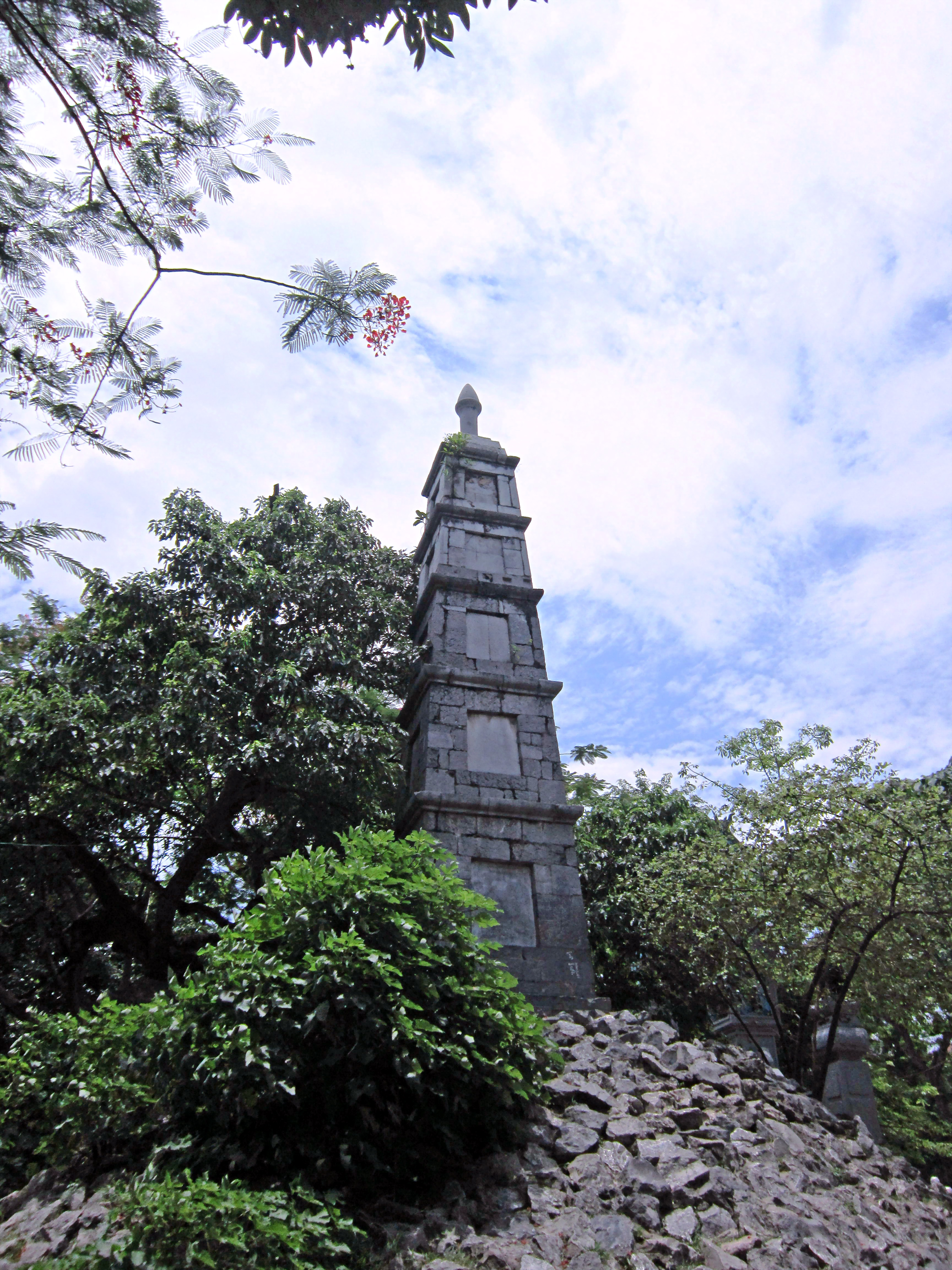 Tháp Bút ở bên Hồ Gươm là một ngọn tháp bằng đá cao 4m được xây dựng năm 1865 ở phía ngoài lối vào cầu Thê Húc dẫn đến đền Ngọc Sơn (Hà Nội, Việt Nam).